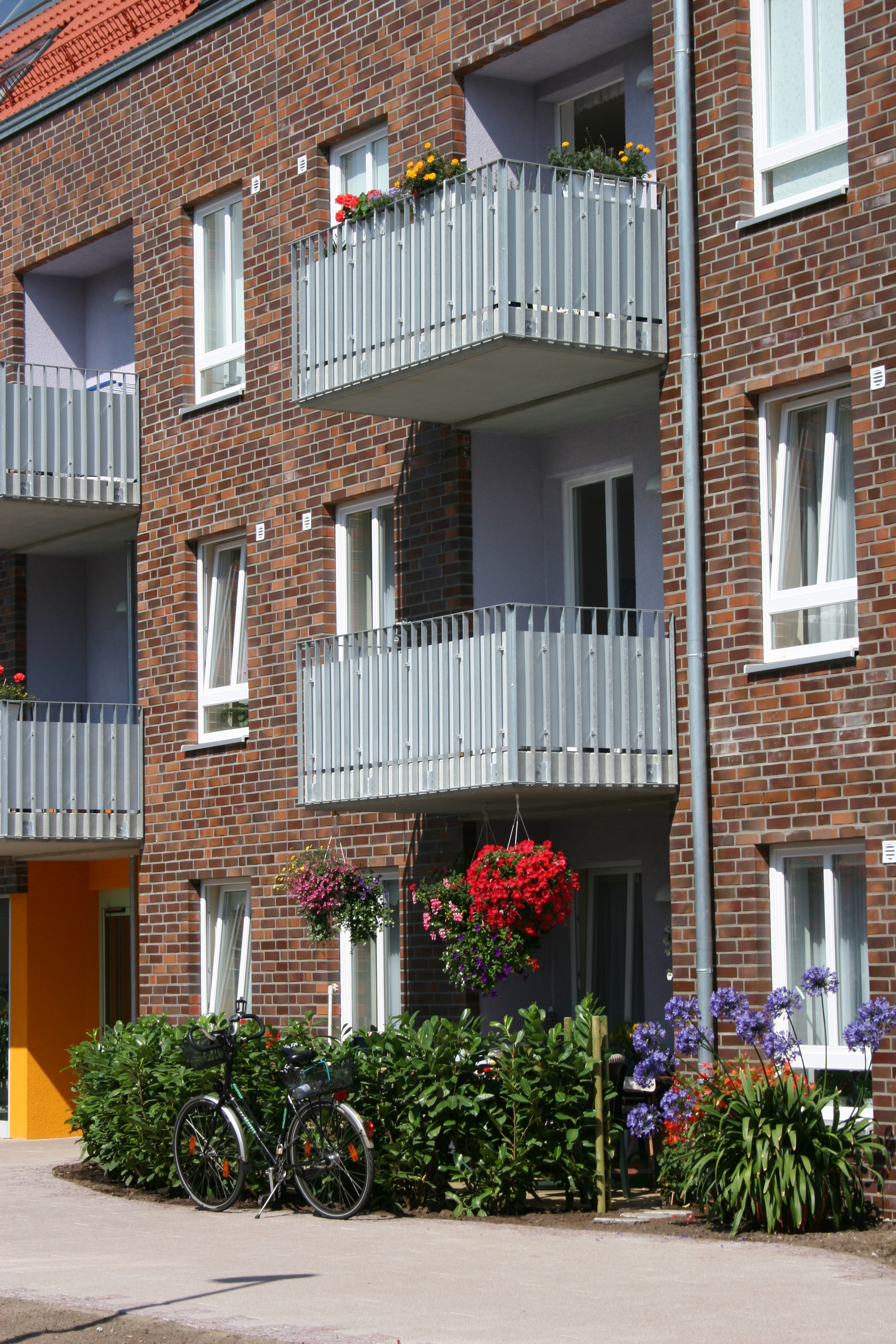 Balkon und Terrasse in Neumünster